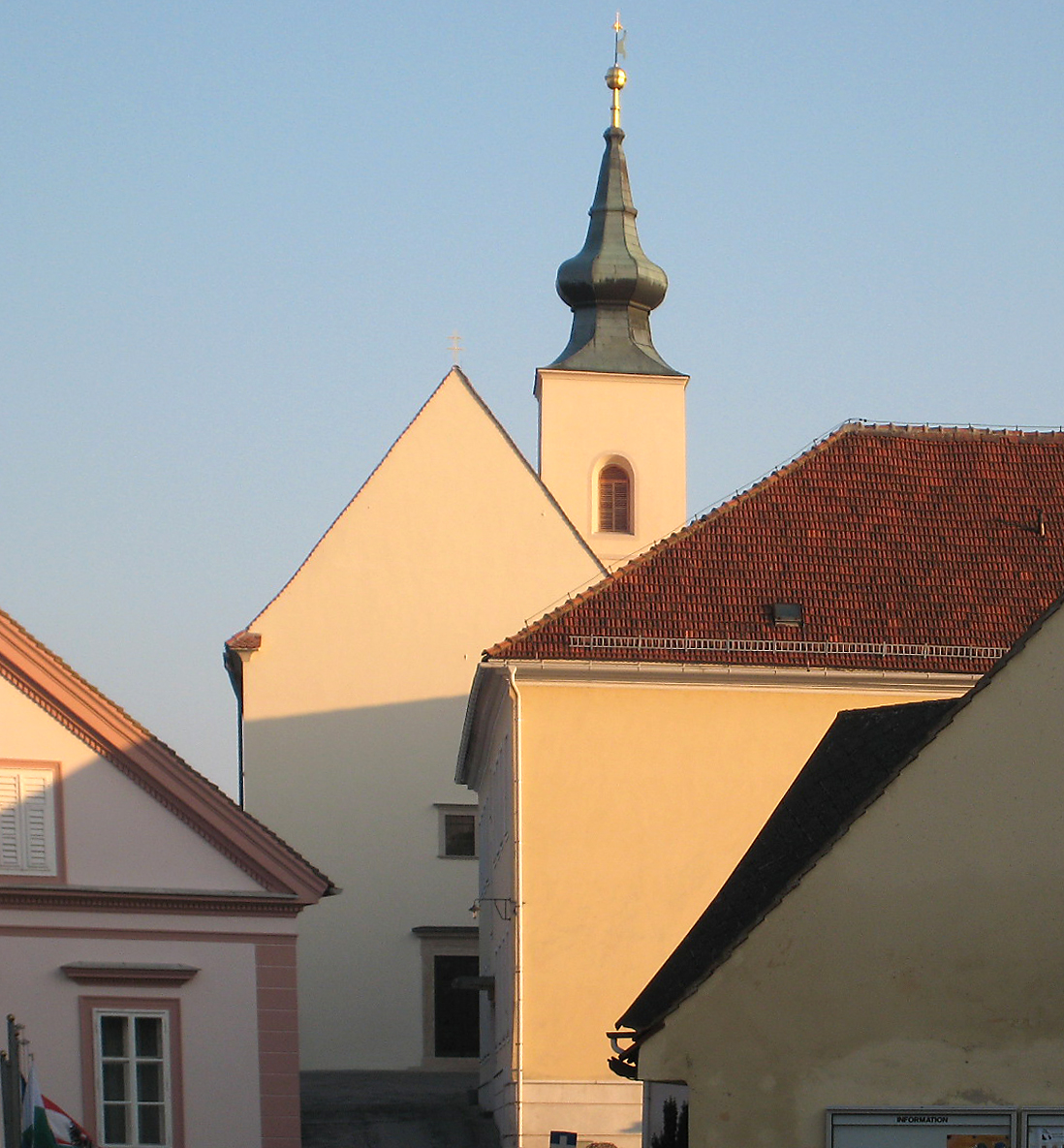 Kath. Filialkirche, hl. Florian